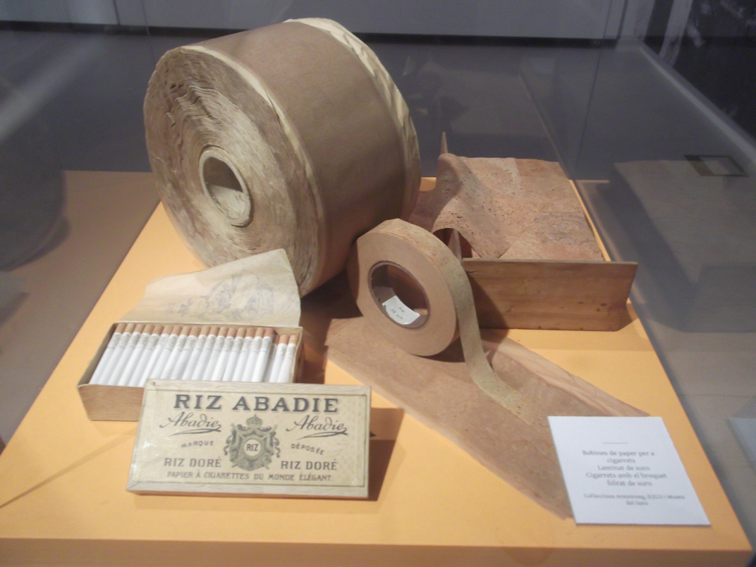 Bobines de paper per a cigarrets. Laminat de suro. Cigarrets amb el broquet folrat de suro. Col·leccions Armstrong, ILECO i Museu del Surp